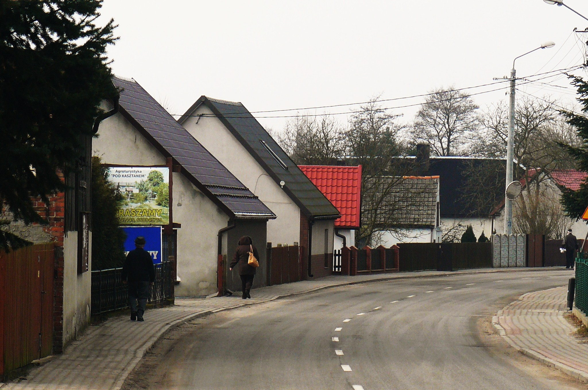 Chojno-Wieś. Widok z centrum miejscowości.